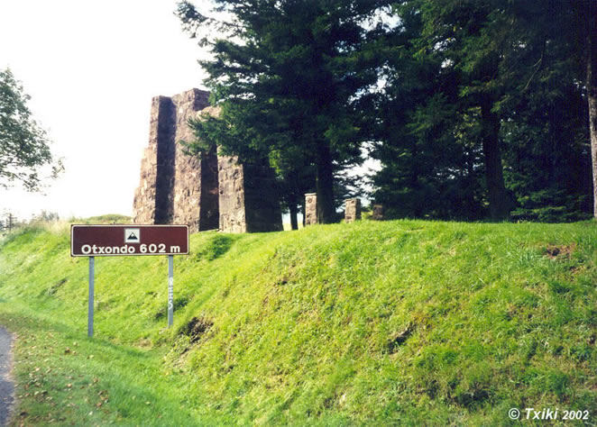 Col d'Otxondo (Navarre) Pyrénées).